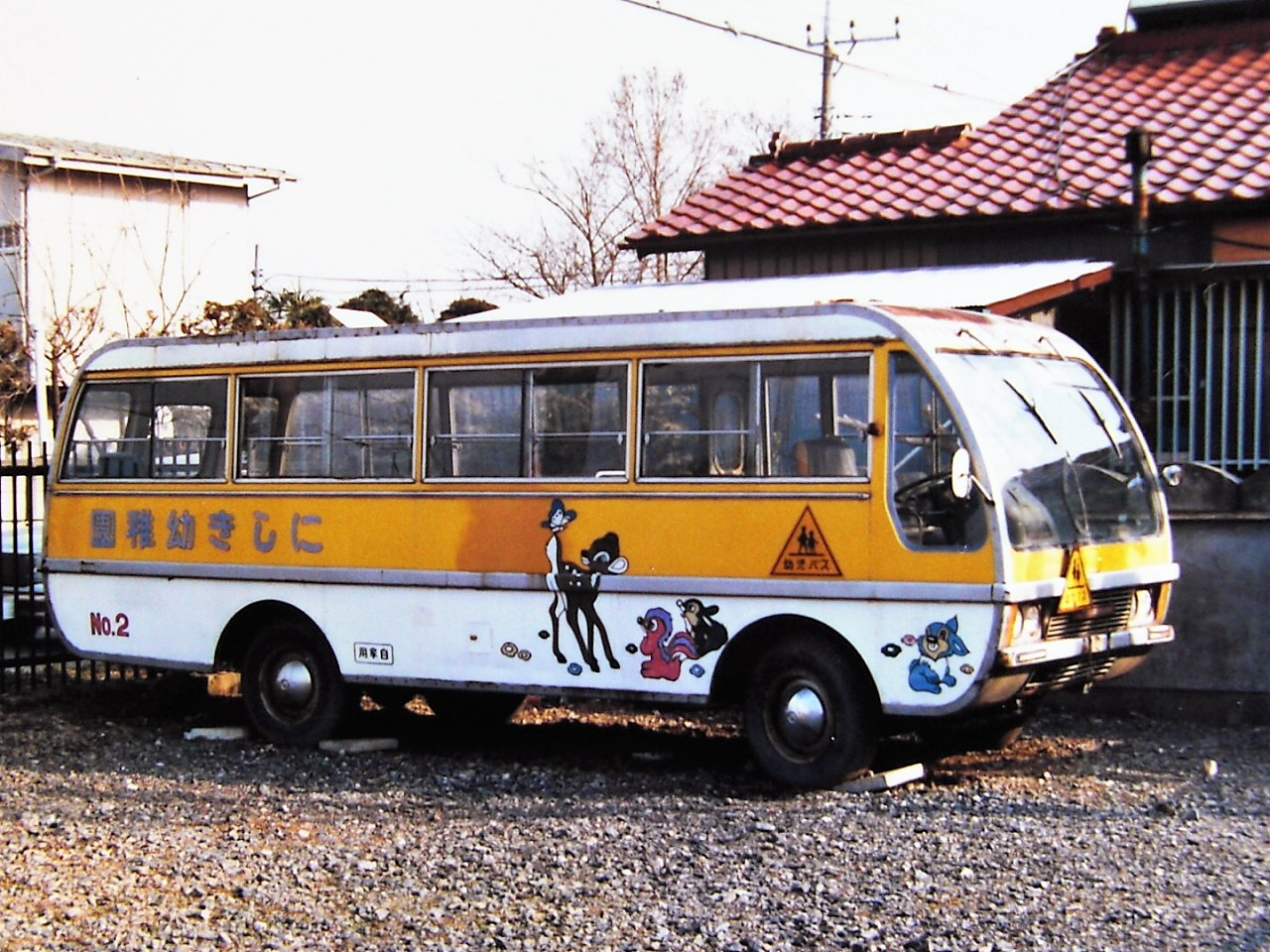 マツダ株式会社 ライトバス タイプA